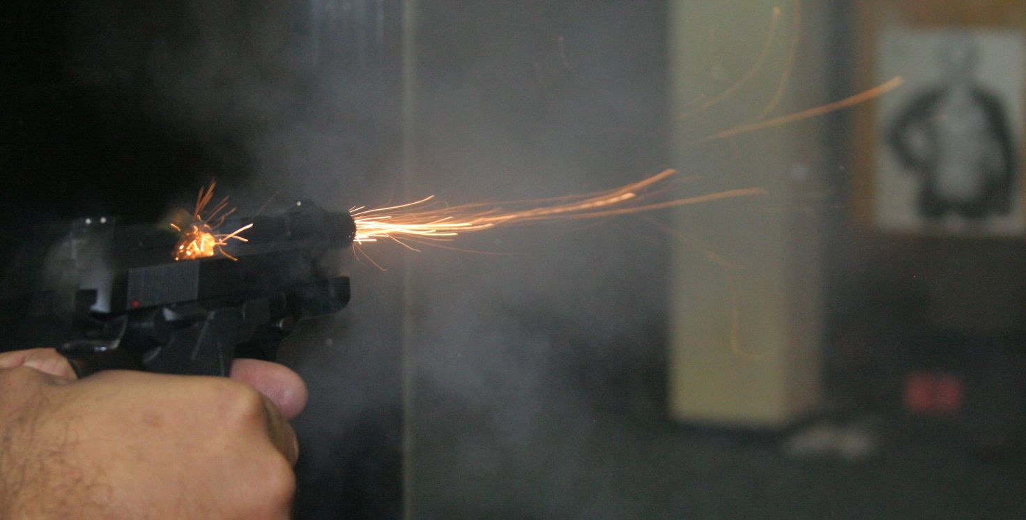 Pistola Taurus PT58S calibre 380 no momento do disparo. Licensing Fonte/Créditos: Eduardo Xavier